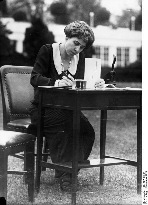 Washington. Die Präsidentin der Vereinigten Staaten bei einer schriftlichen Morgenarbeit im Garten des Weißen Hauses.